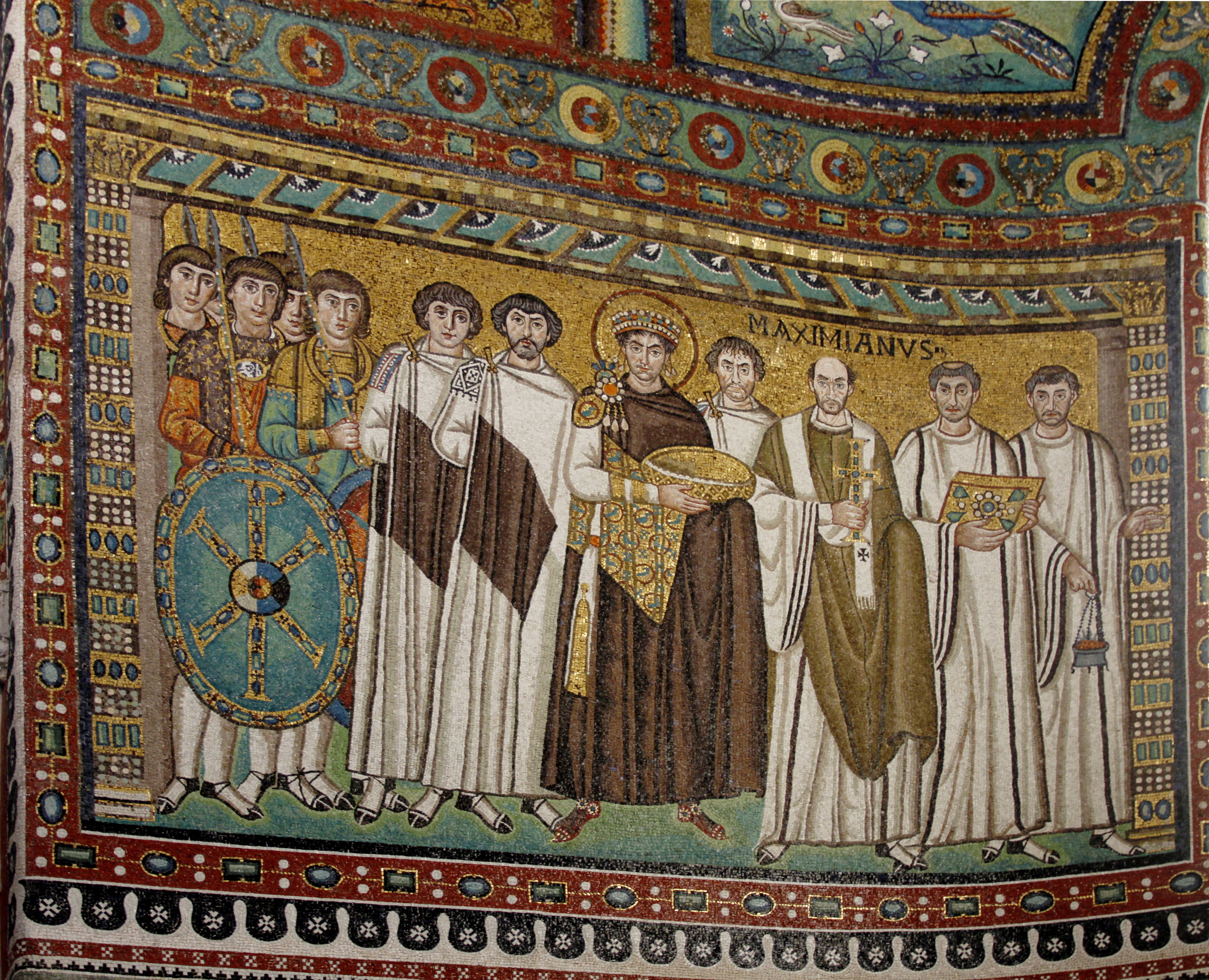 San Vitale - Ravenna